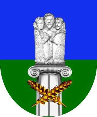 Herb gminy i wsi Kołaczkowo.